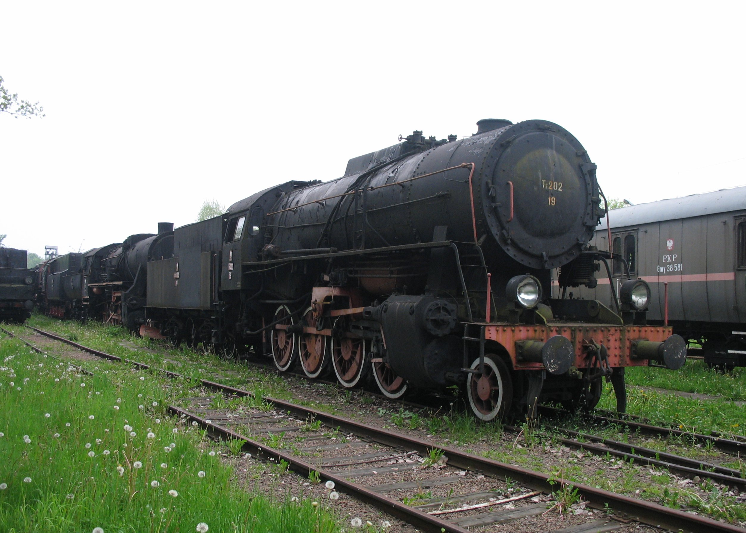 Lokomotywa parowa Tr202-19. Eksponat skansenu taboru kolejowego w Chabówce